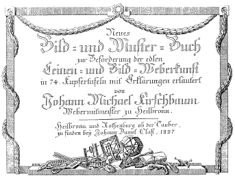 Neues Bild- und Muster-Buch zur Beförderung der edlen Leinen- und Bild-Weberkunst : in 74. Kupfertafeln mit Erklärungen erläutert/Kirschbaum, Johann Michael. - [4. Auflage]. - Heilbronn und Rothenburg ob der Tauber : Claß, 1827